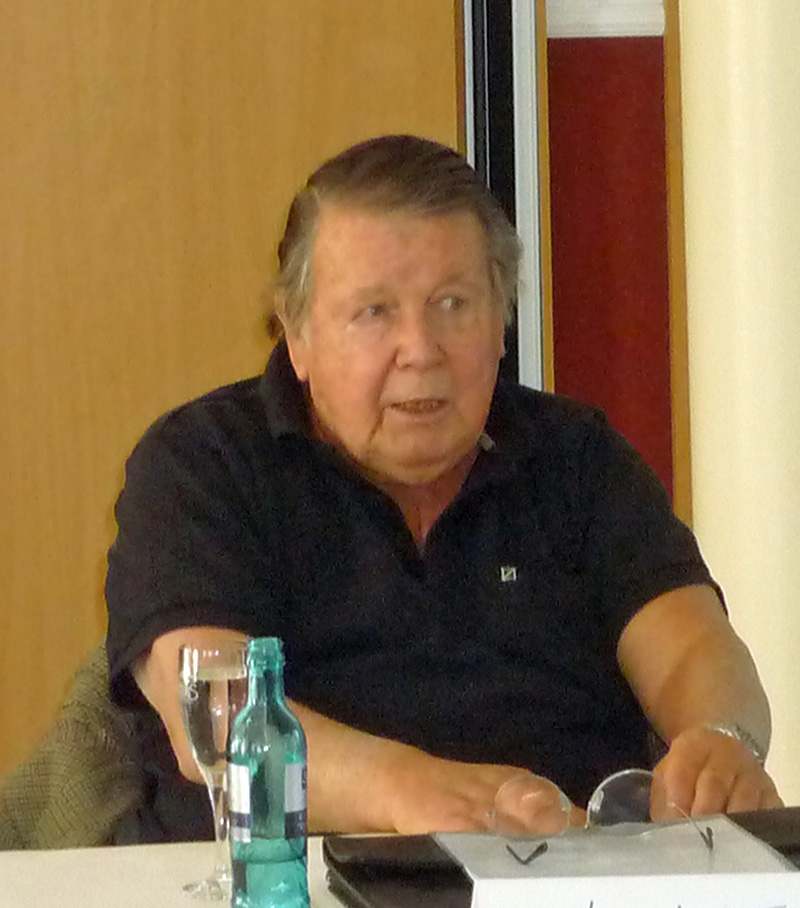 Lothar Loewe bei einem Vortrag im Juli 2009